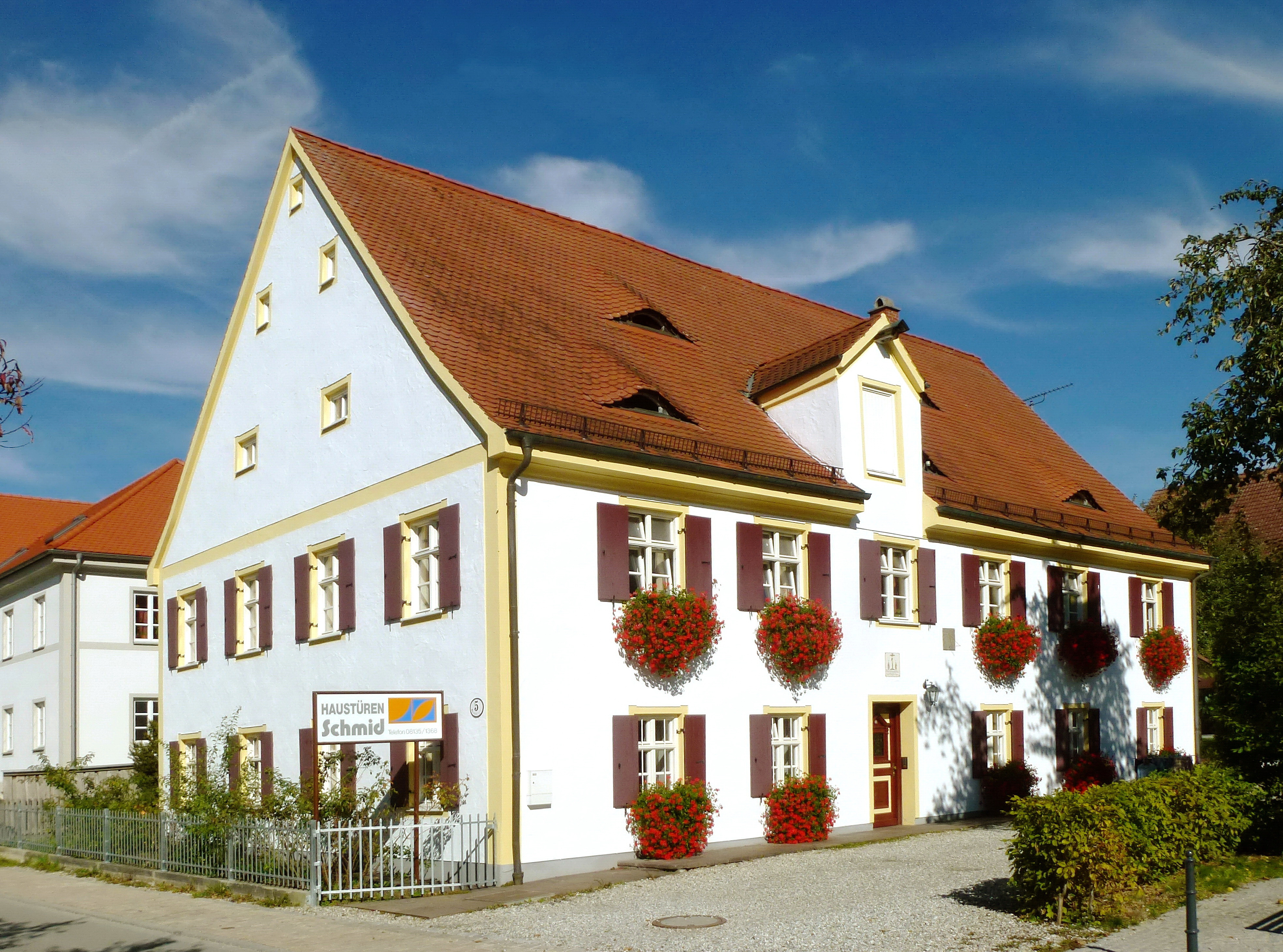 Sulzemoos, Kirchstr.5: Ehemaliges Pfarrhaus mit Dachauer Haustafel (mittig oberhalb der Eingangstür) und kleiner Sonnenuhr (rechts oberhalb der Eingangstür), Ansicht aus SW